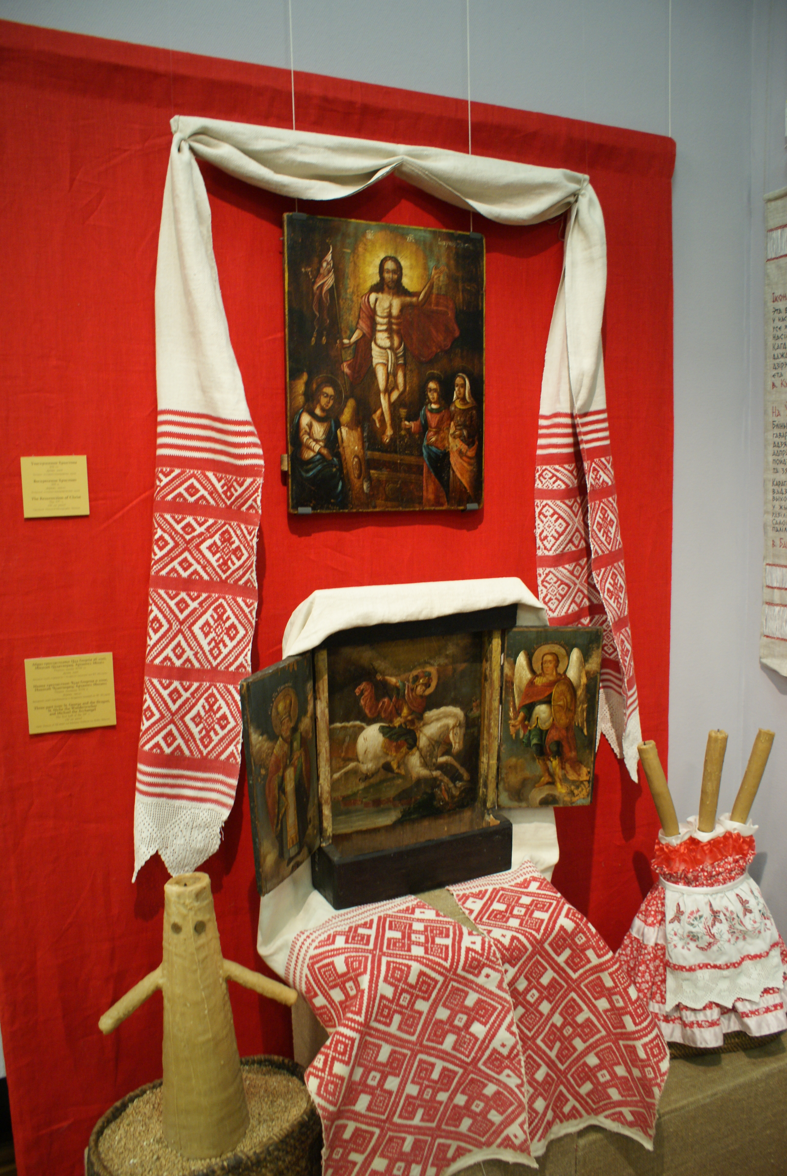 Выстаўка ікон Бабіцкай школы. Афармленне экспазіцыі